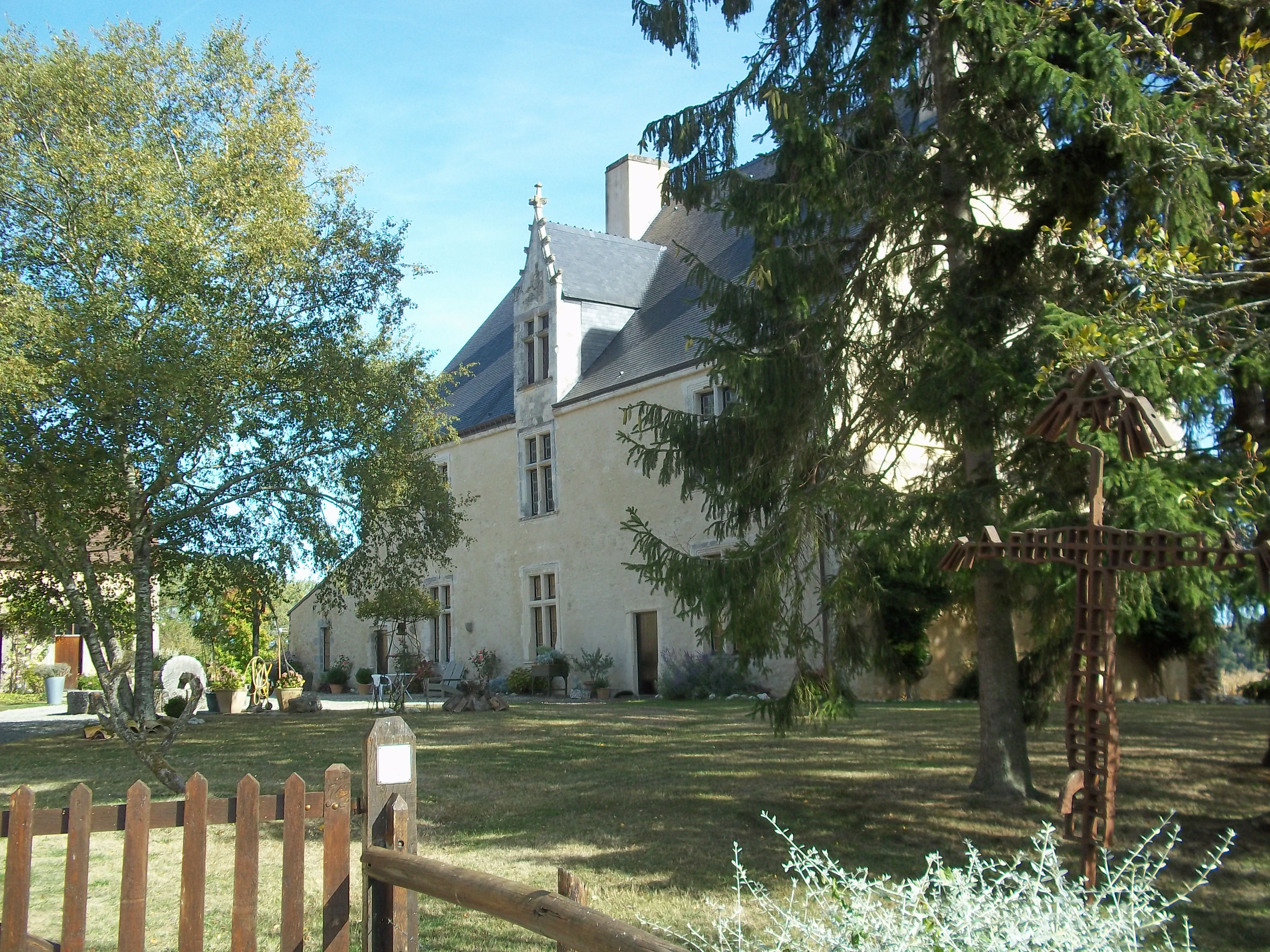 Manoir - Commune d'Ancinnes - Sarthe - France